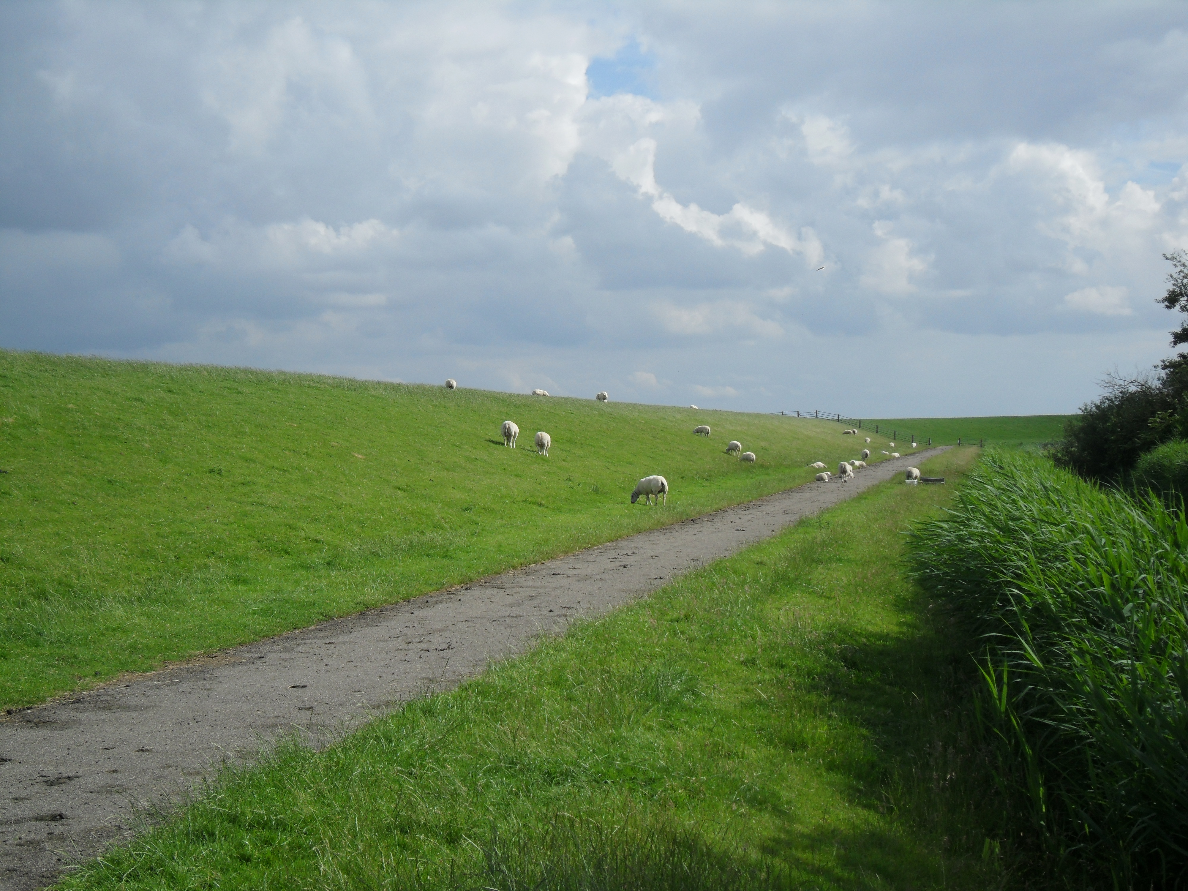 Schafe auf dem Deich von Schiermonnikoog